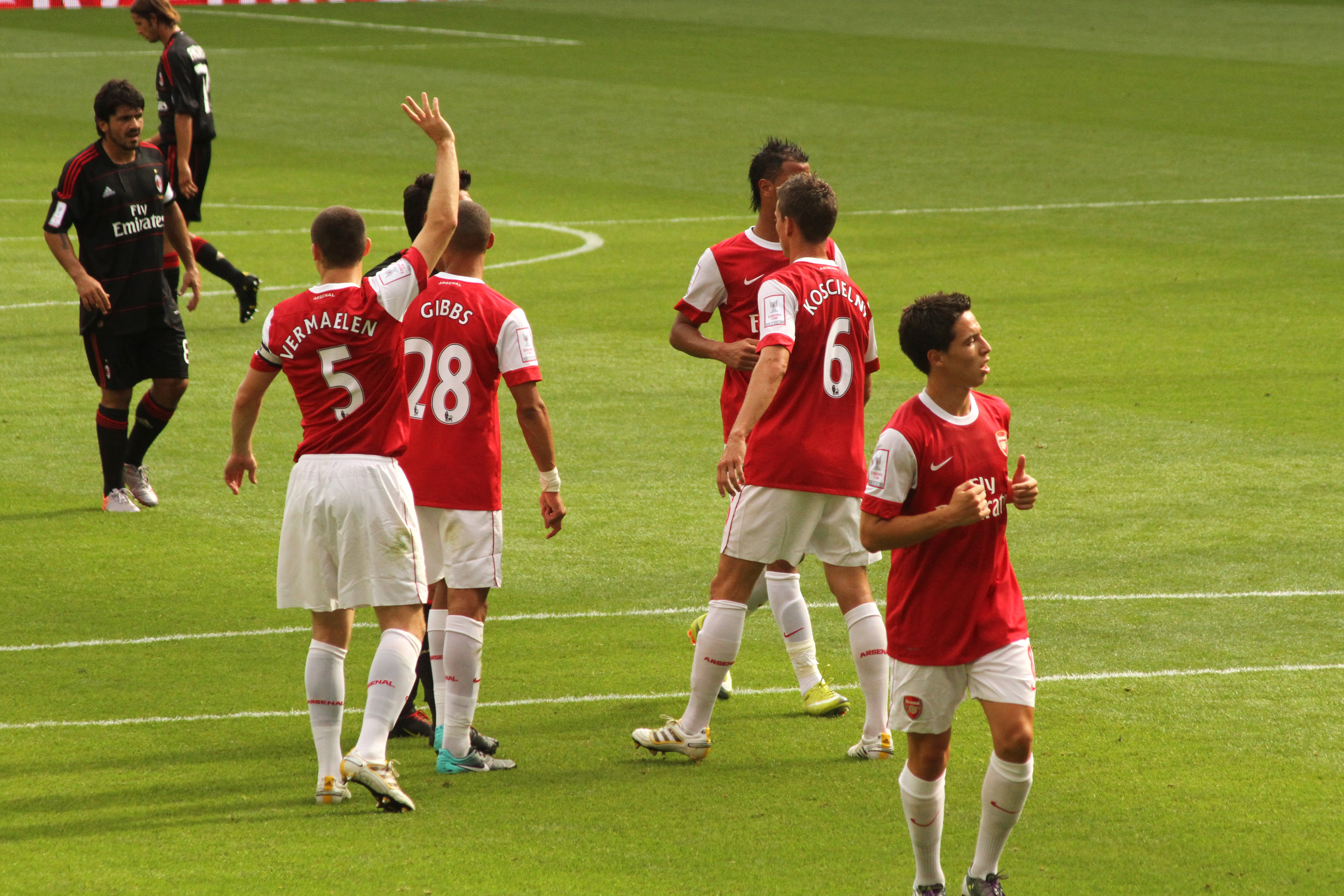 Thomas Vermaelen, Kieran Gibbs, Laurent Koscielny & Samir Nasri